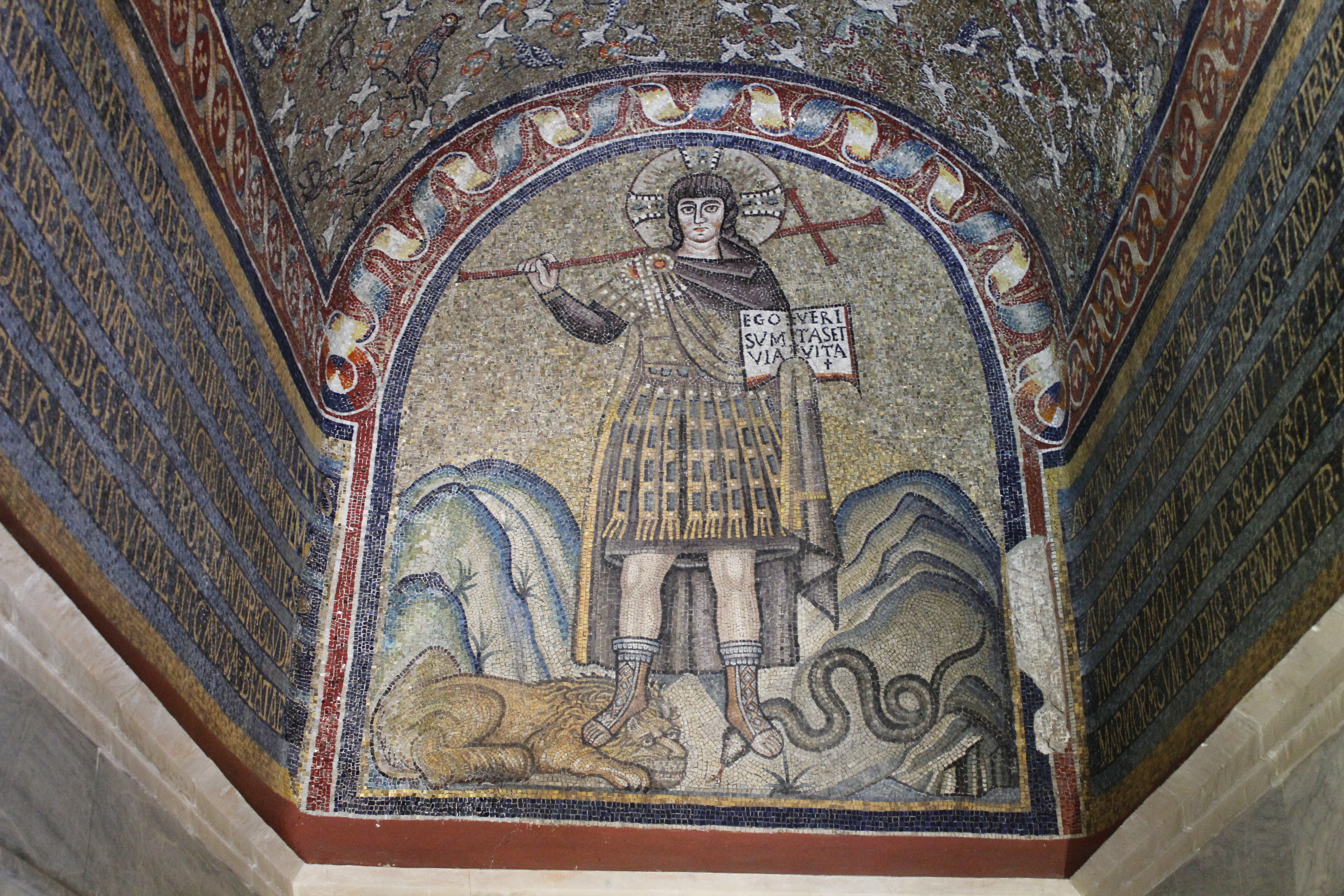 Cappella arcivescovile, Ravenna